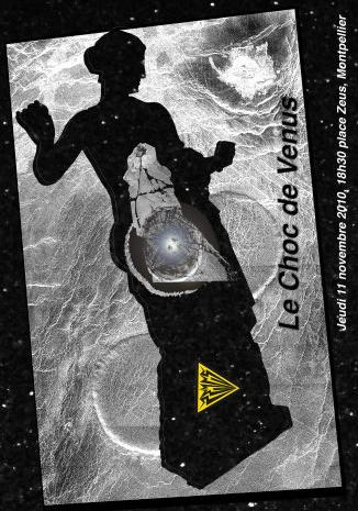 performance de Zevs, artiste urbain réalisée à Montpellier en hommage à la Vénus d'Arles